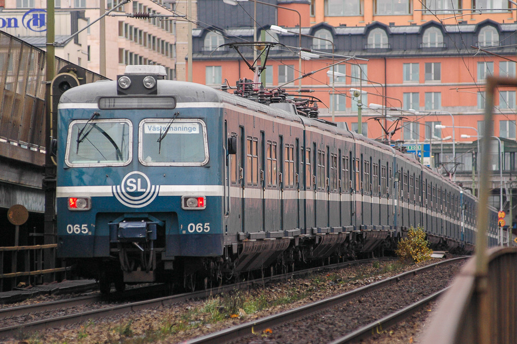 X420 065 Södra Järnvägsbron,Stockholm 2004-10-21